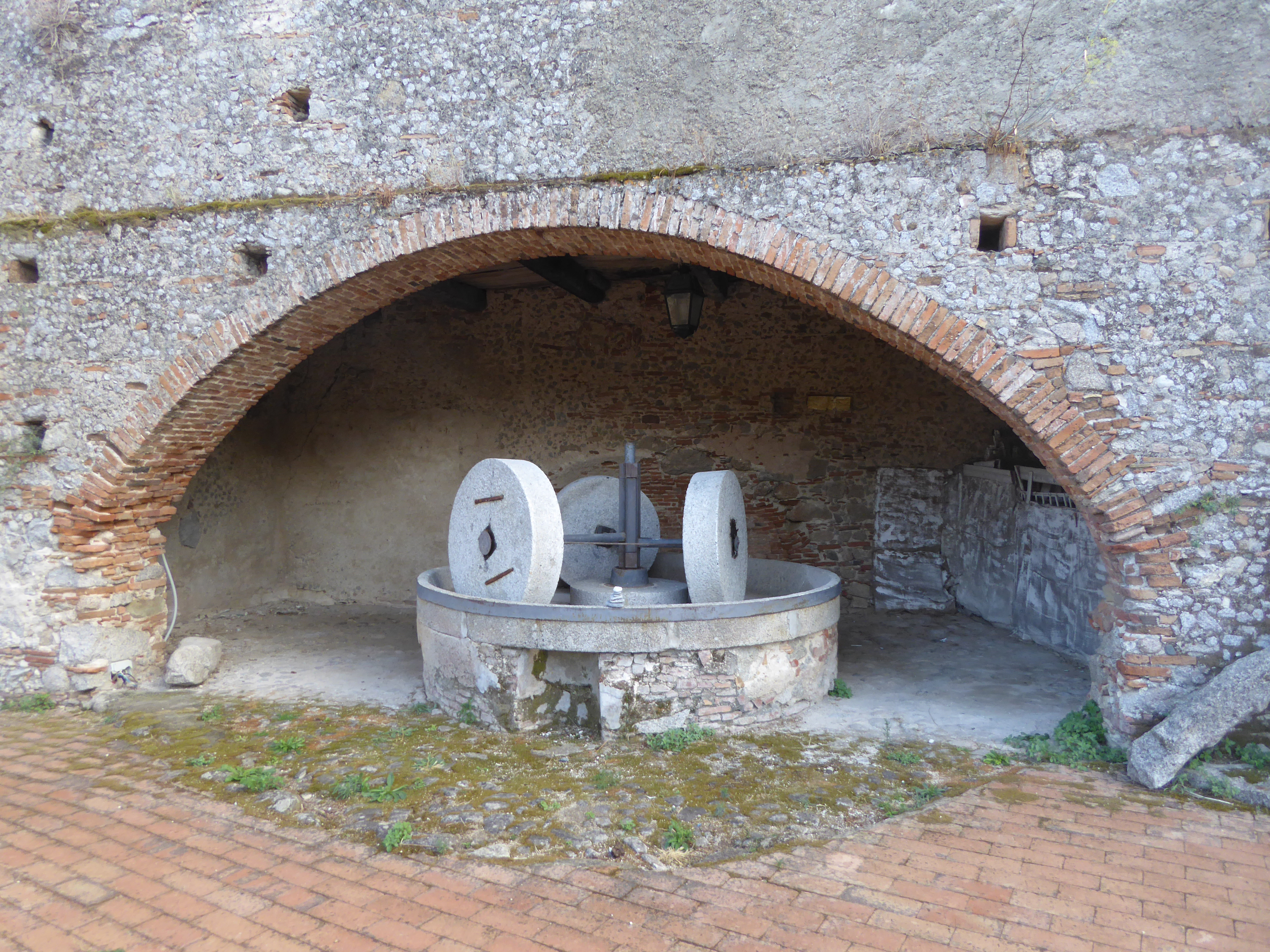 Ricostruzione del mulino a Riace (2018)